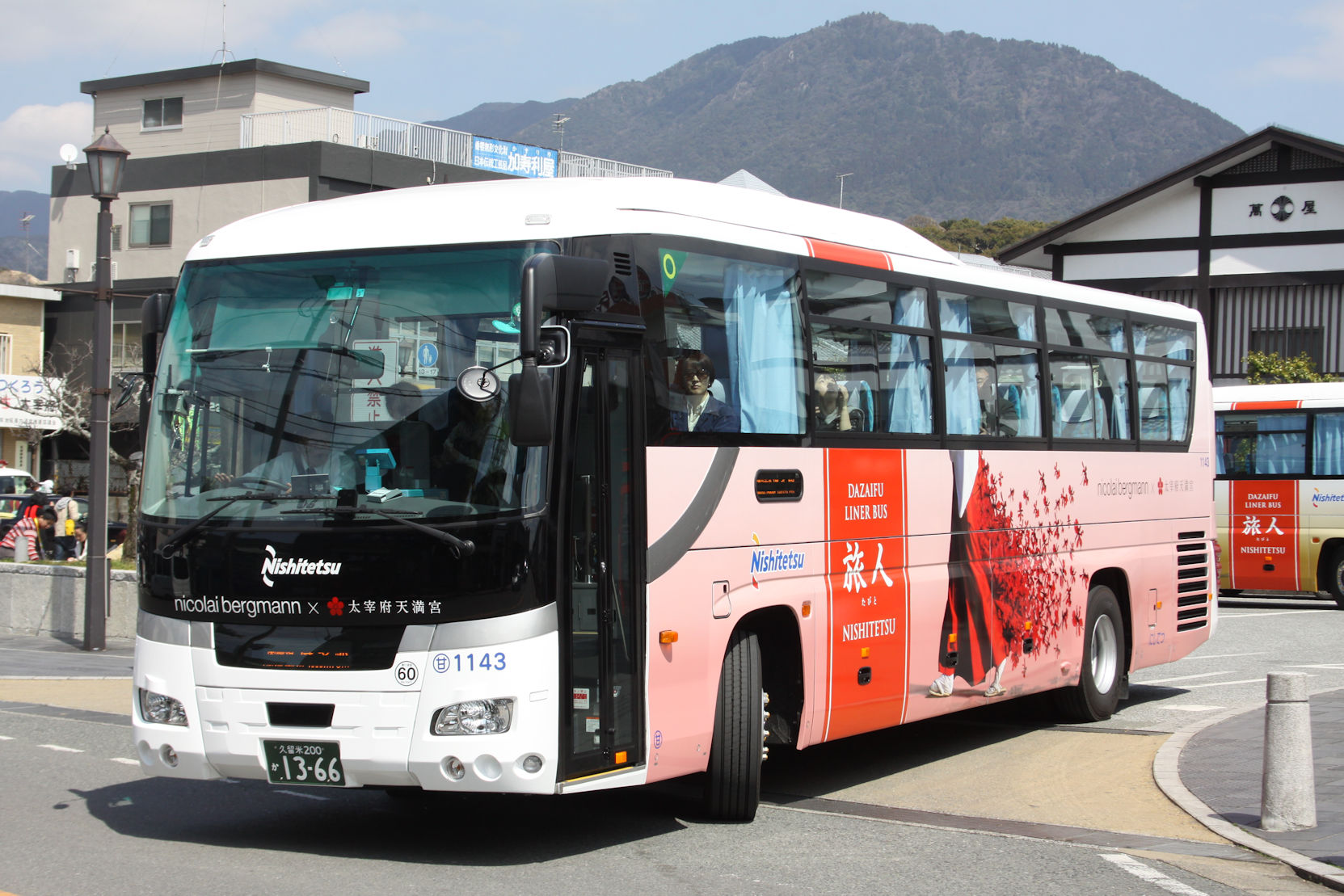 西鉄バス1143（いすゞ・ガーラ）